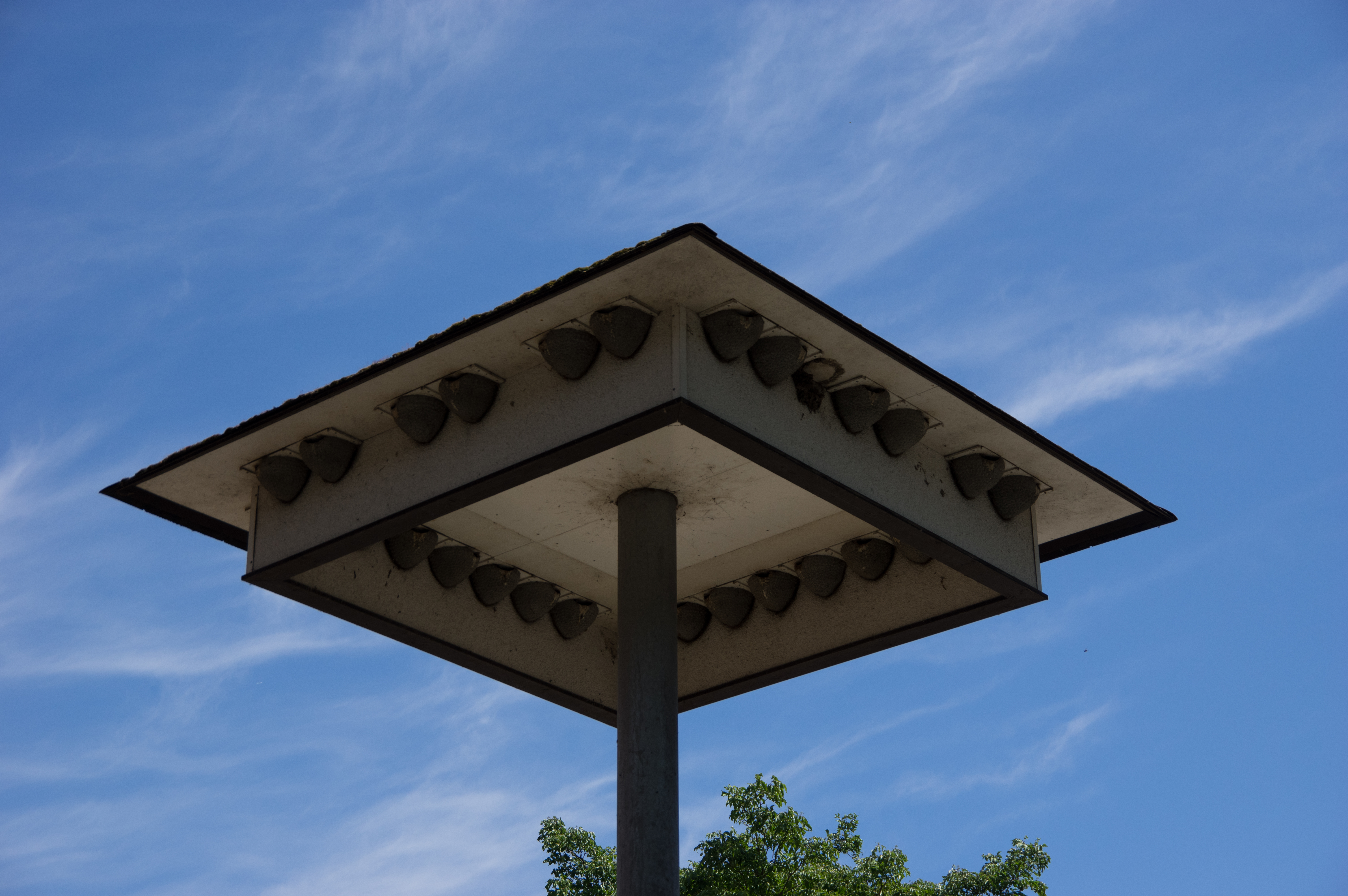 Blankenfelde-Mahlow in Brandburg. Da Schwalbenhaus befindet sich im Ortsteil Jühnsdorf.